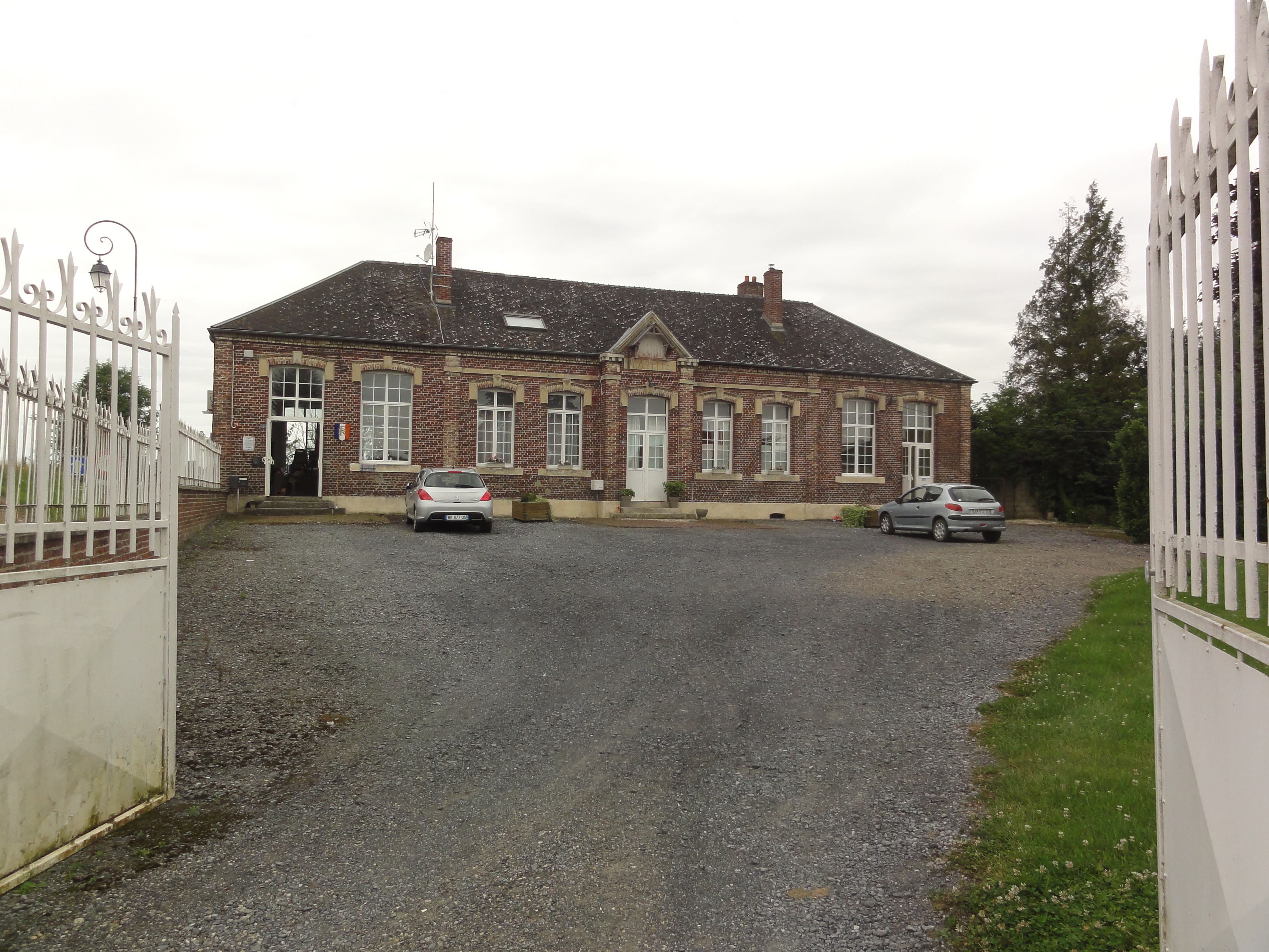 Sommette-Eaucourt (Aisne) mairie